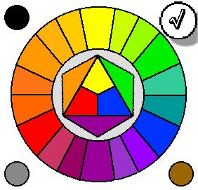 kolorcirklo (mem farita de la vikipediistino bab en 2004) kun markigo BLANKA koloro